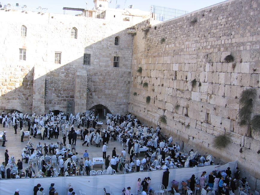 The Wester Wall (הכותל המערבי)